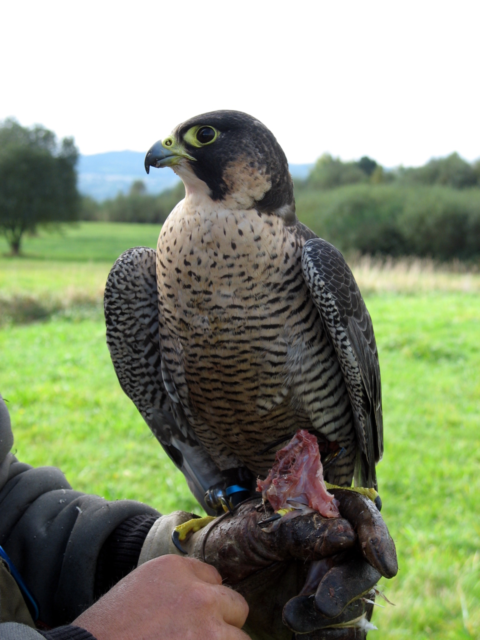 Falcon